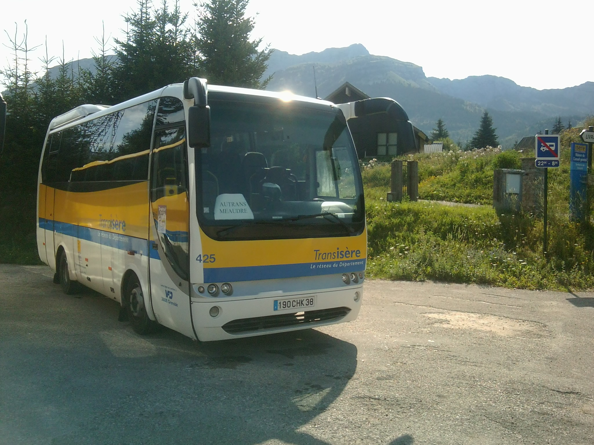 L'autocar Transisère (transporteur VFD), au dépôt de la maison du conseil général de Villard-de-Lans.